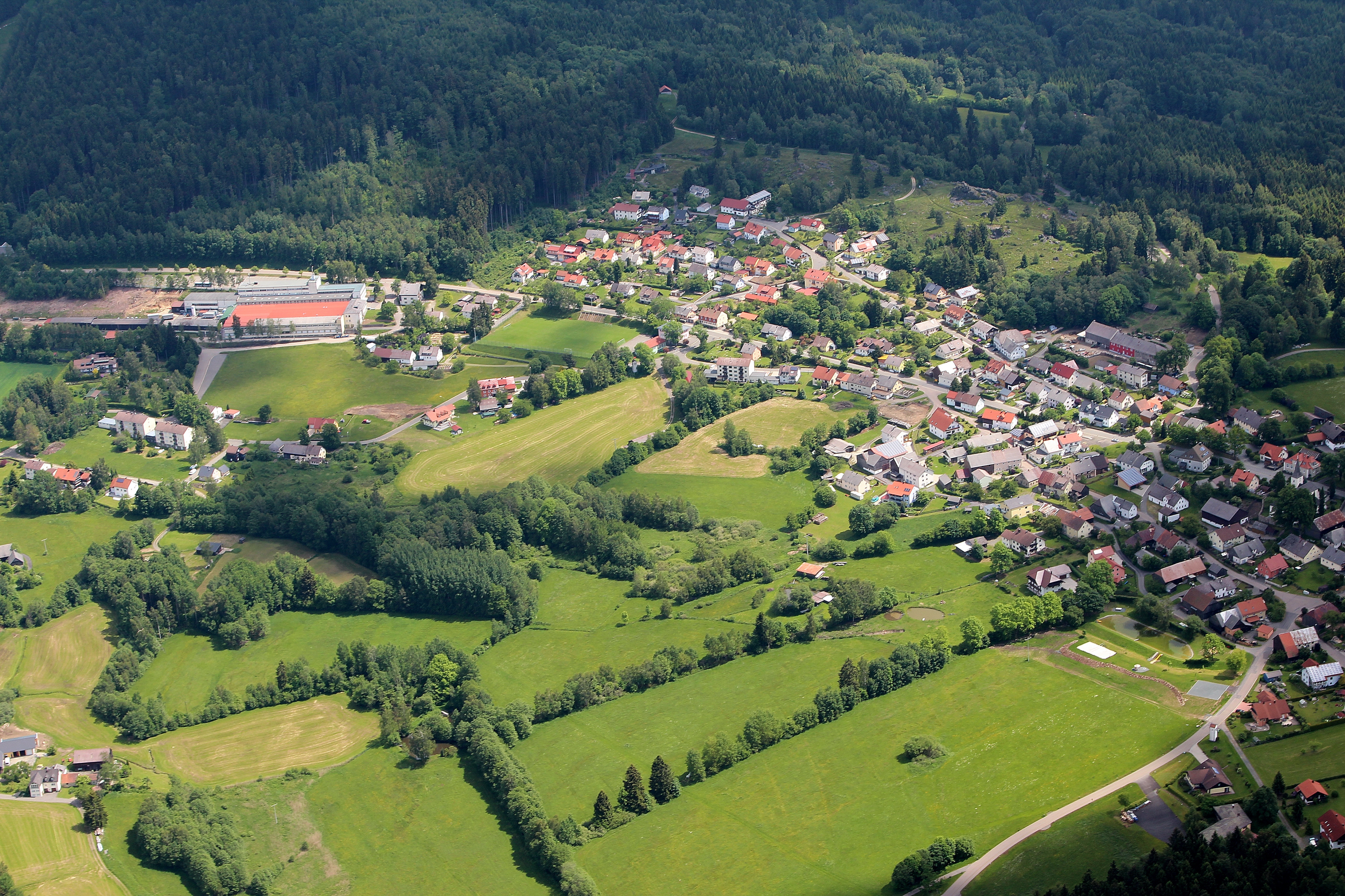 Stadlern, Landkreis Schwandorf, Oberpfalz, Bayern